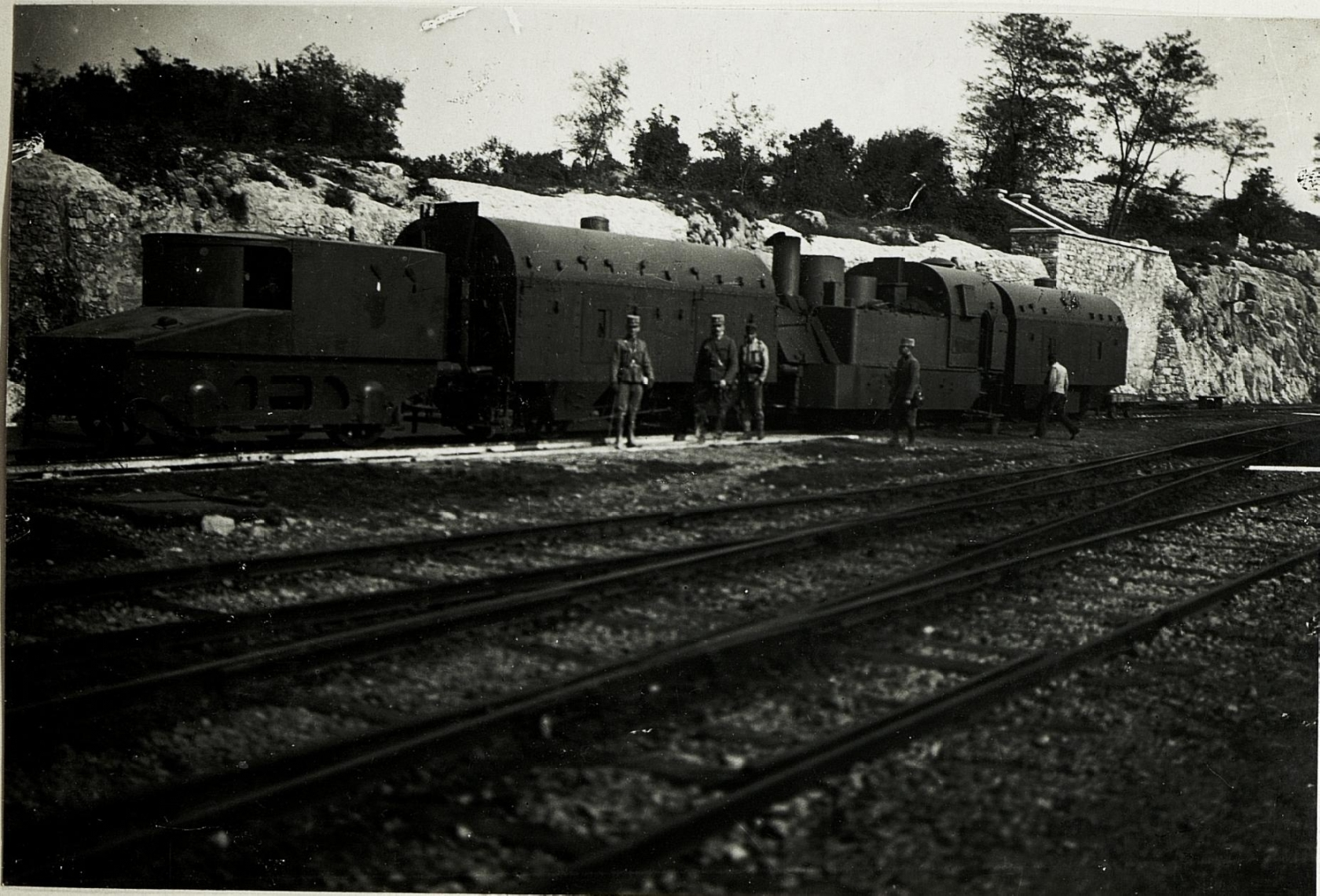 Panzerzug in Nabresina.